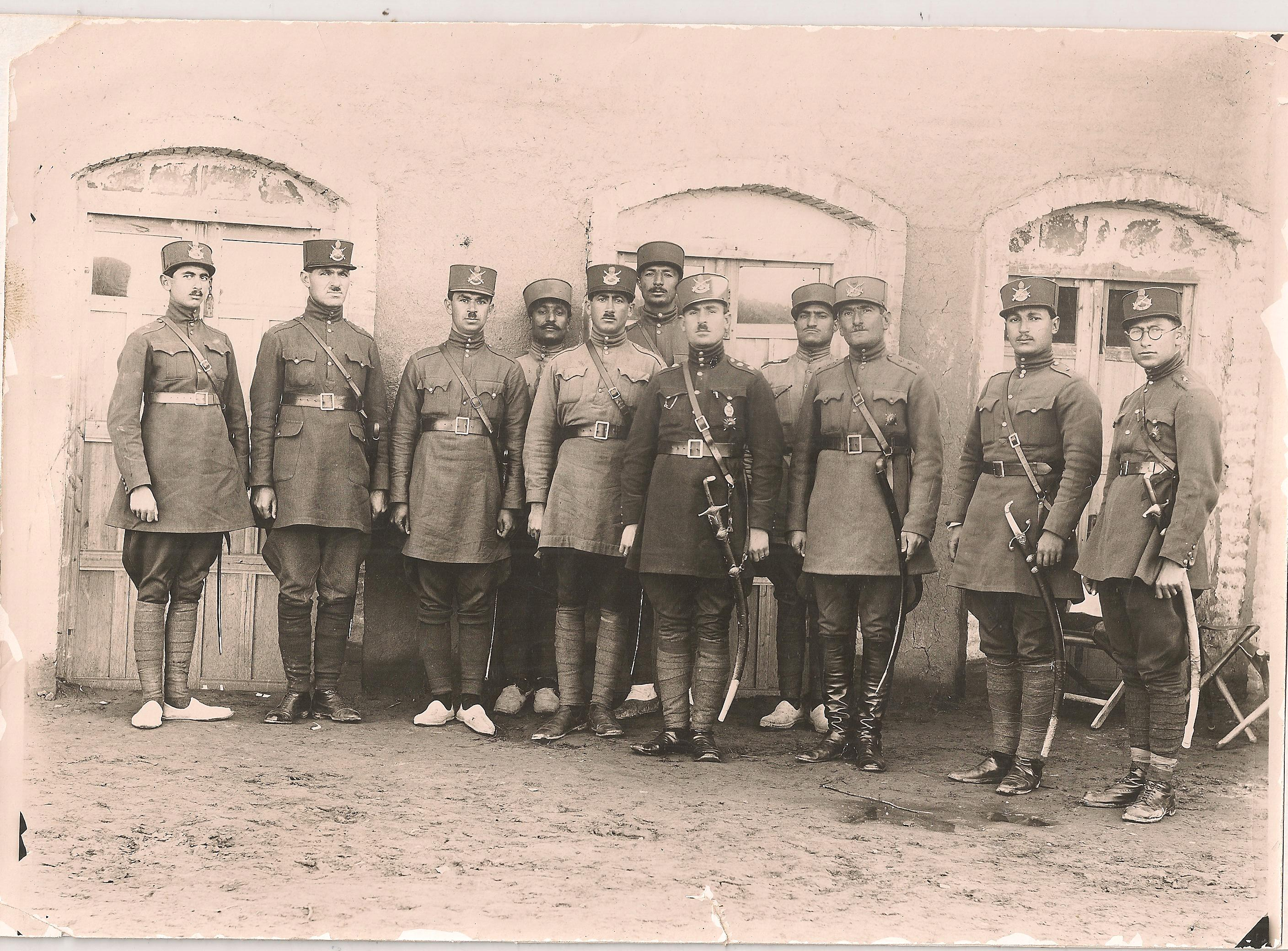 احمد زاویه و تعدادی از نیرو های تحت فرمانش